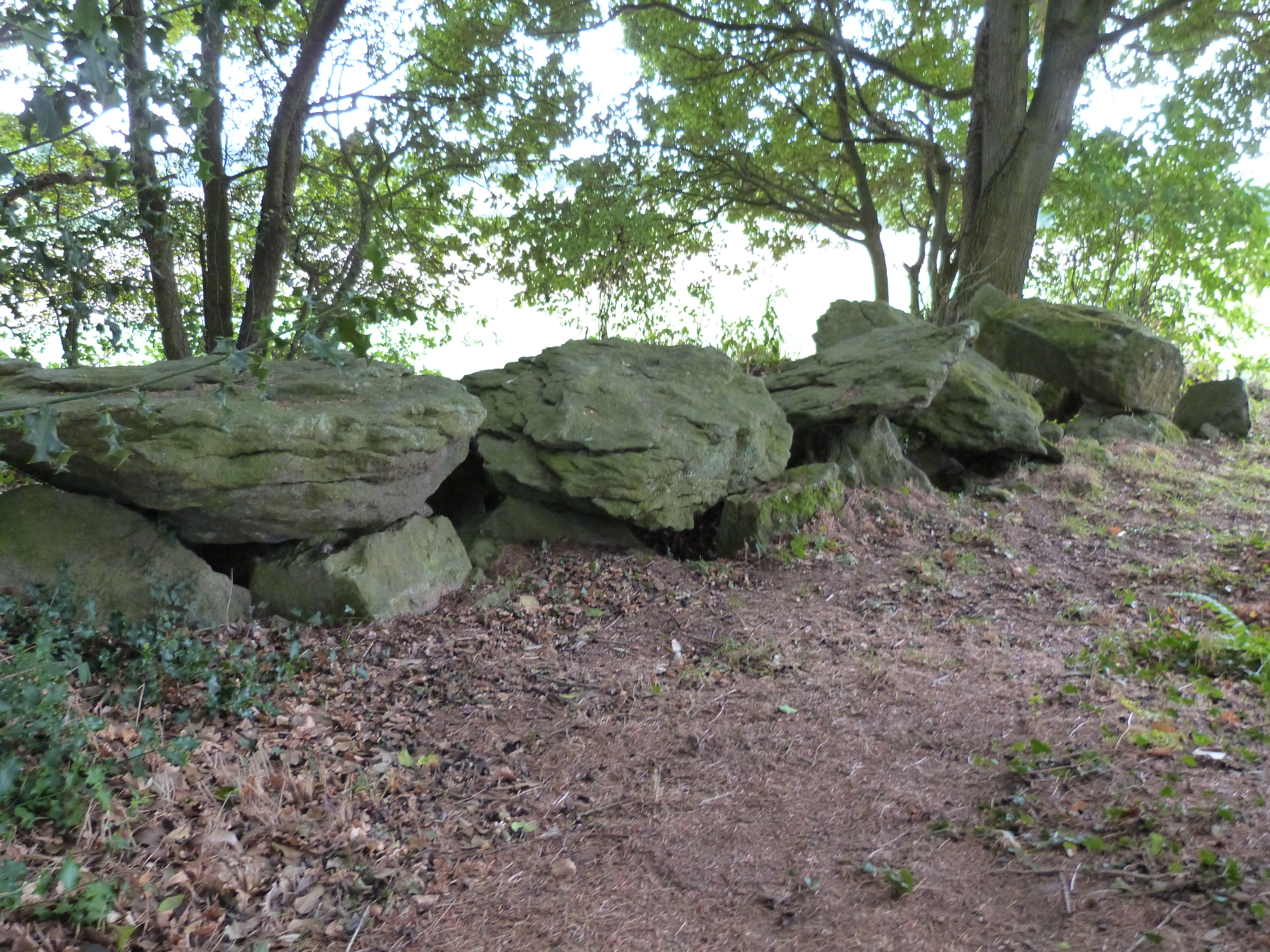 Allée couverte du Champ-Grosset située à Quessoy